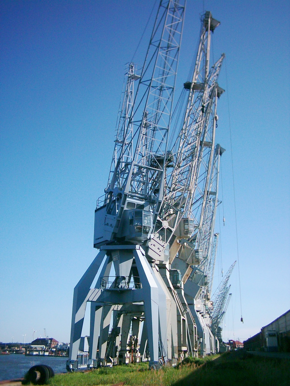 Alte Hafenkräne am 50er Schuppen in Hamburg.